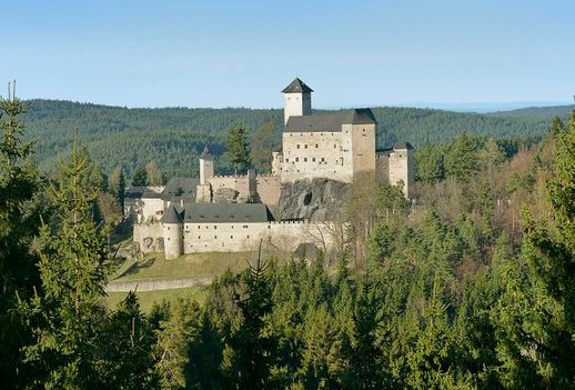 Burg Rappottenstein in Rappottenstein